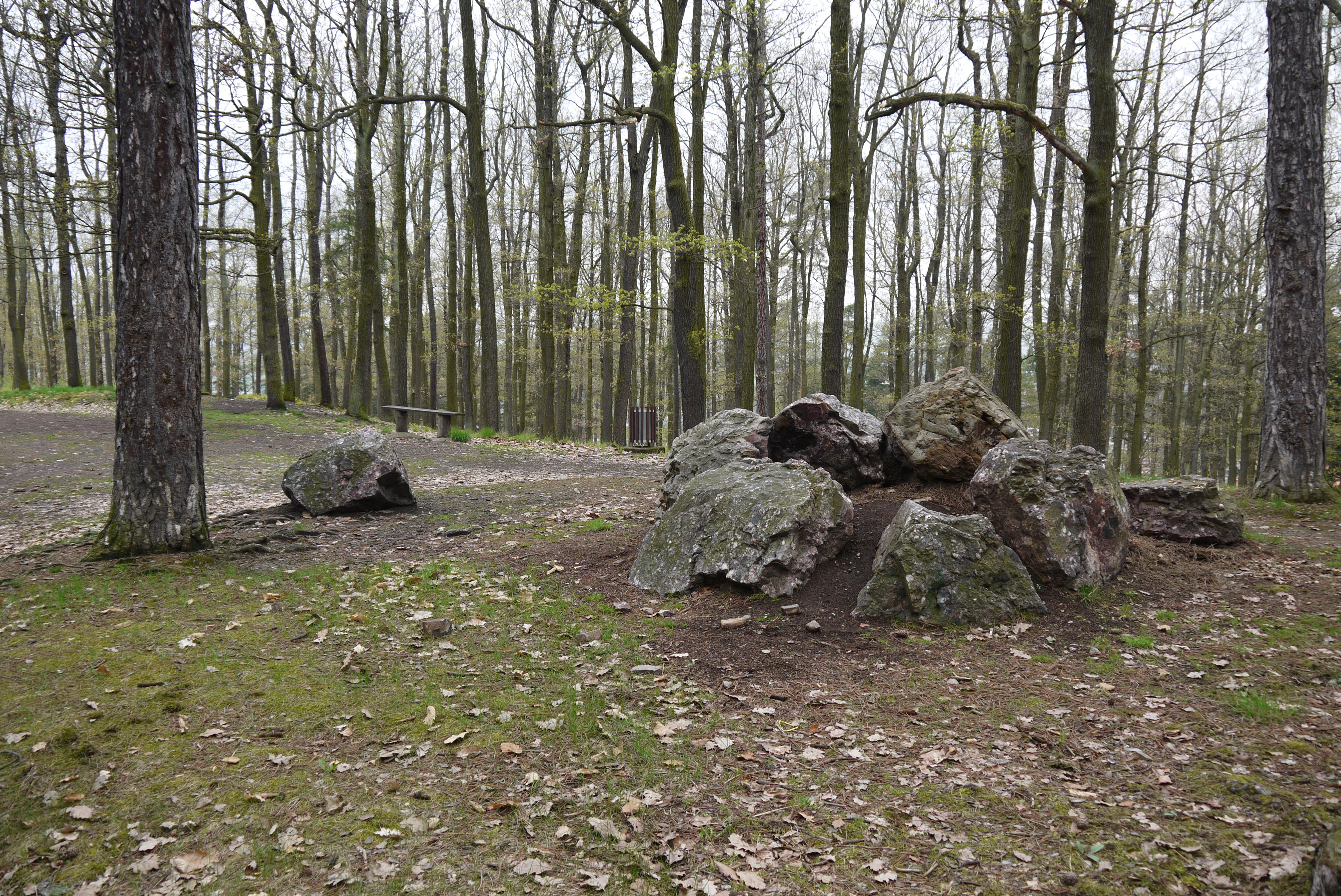 Místo zvané „U tří kamenů“ v hořovickém lesoparku Dražovka, pozůstatek mohyly na Móricově návrší